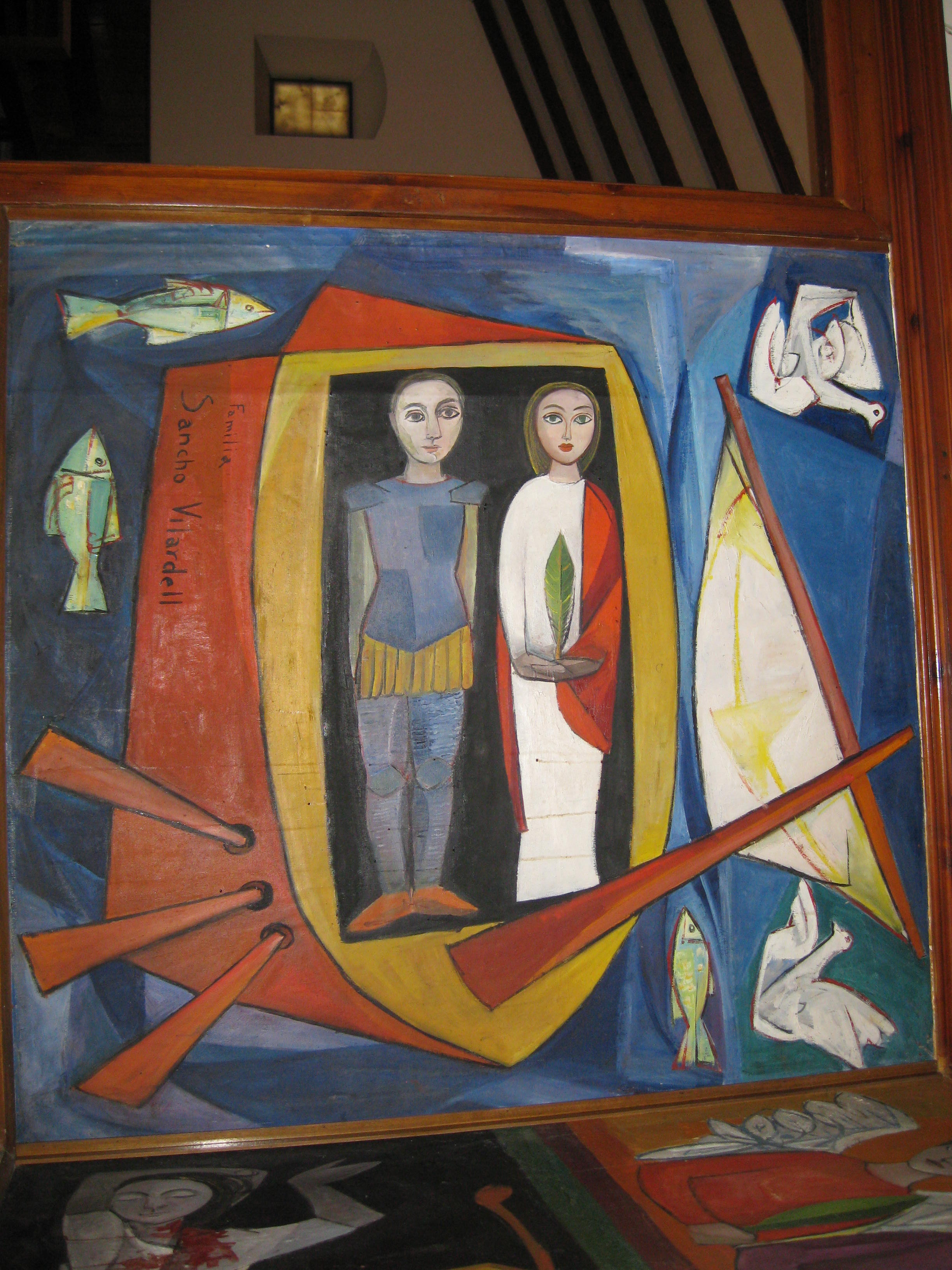 Frescos de la capella de Sant Joan Baptista a Lliçà de Vall, situada a la Masia de Can Coll